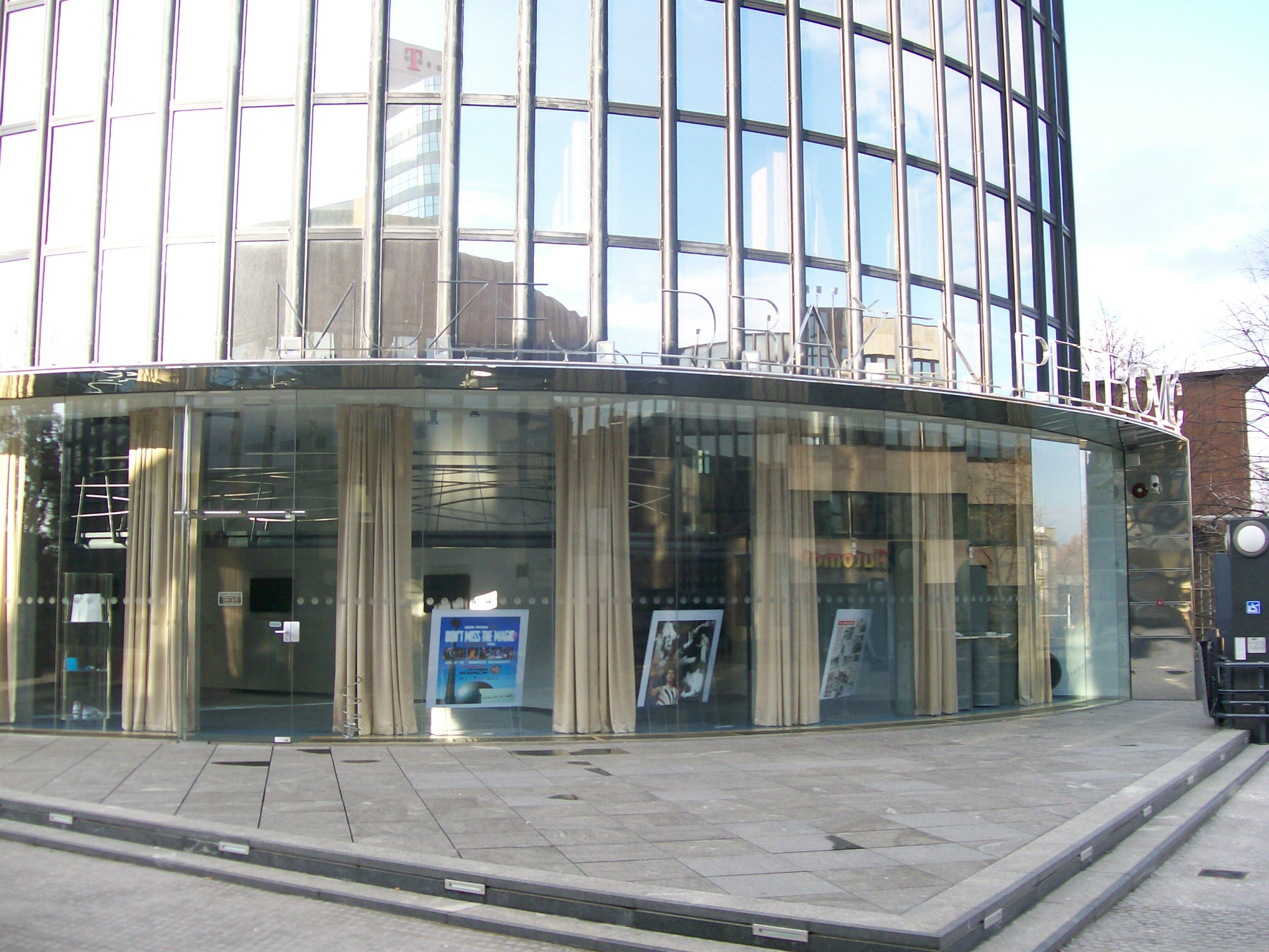 Muzej Dražen Petrović u Zagrebu